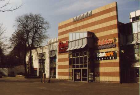 famila-Einkaufszentrum (Bremke & Hoerster) am Vendômer Platz in Gevelsberg (mittlerweile zum Kaufland-Einkaufszentrum umfirmiert)